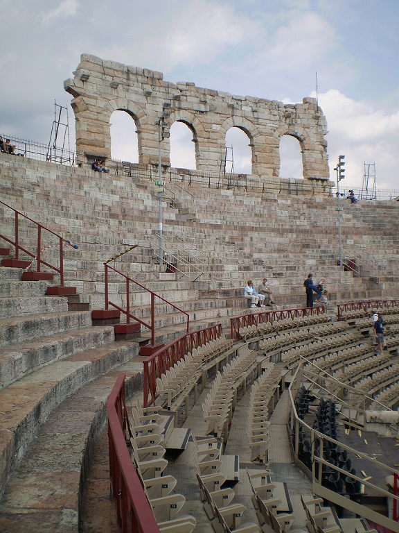 Interior de la Arena de Verona-Foto sacada en 2007